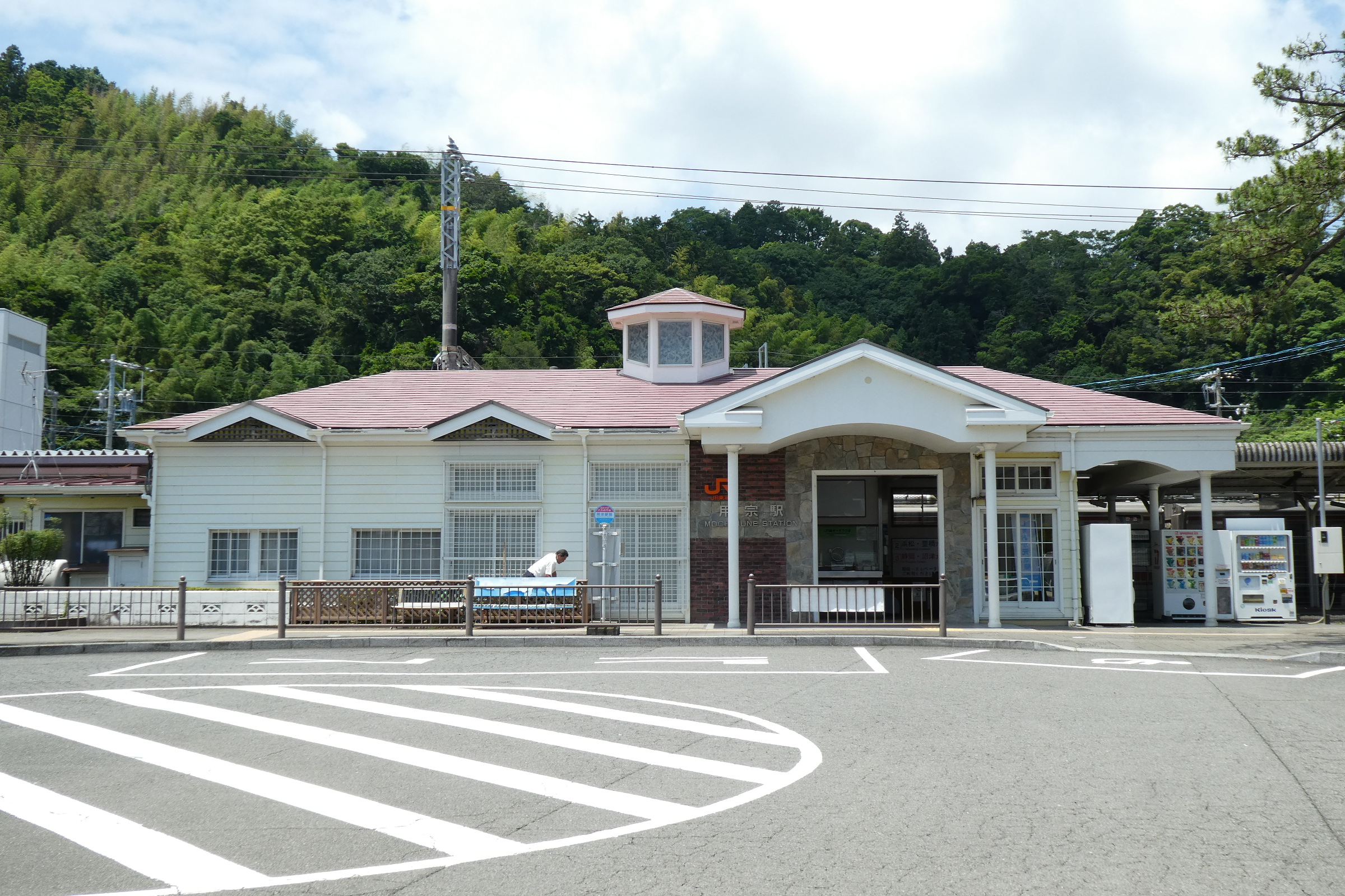 JR東海 東海道本線 用宗駅